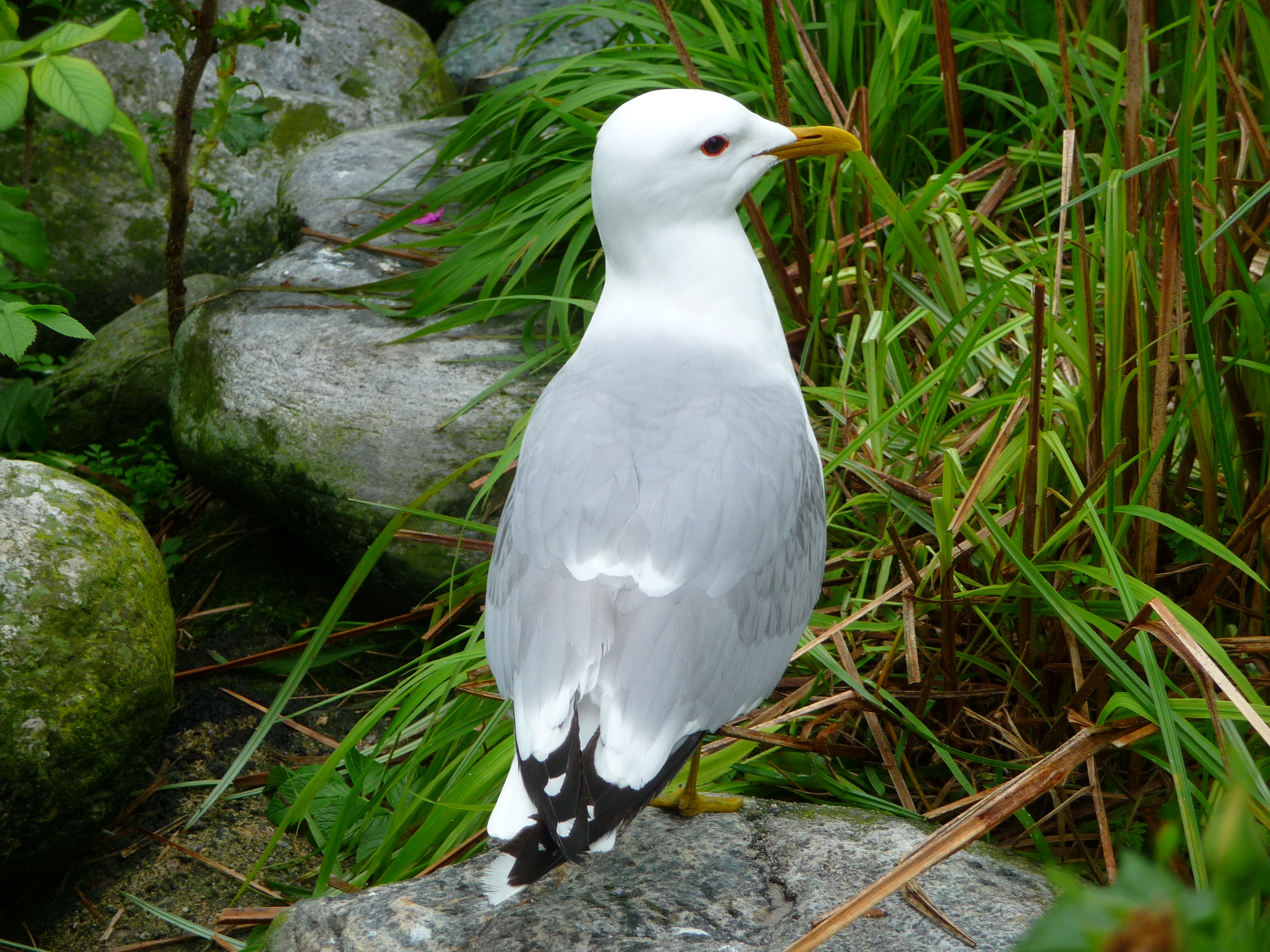 Sturmmöwe (Larus canus), fotografiert im Tiergarten Heidelberg (Baden-Württemberg, Deutschland)